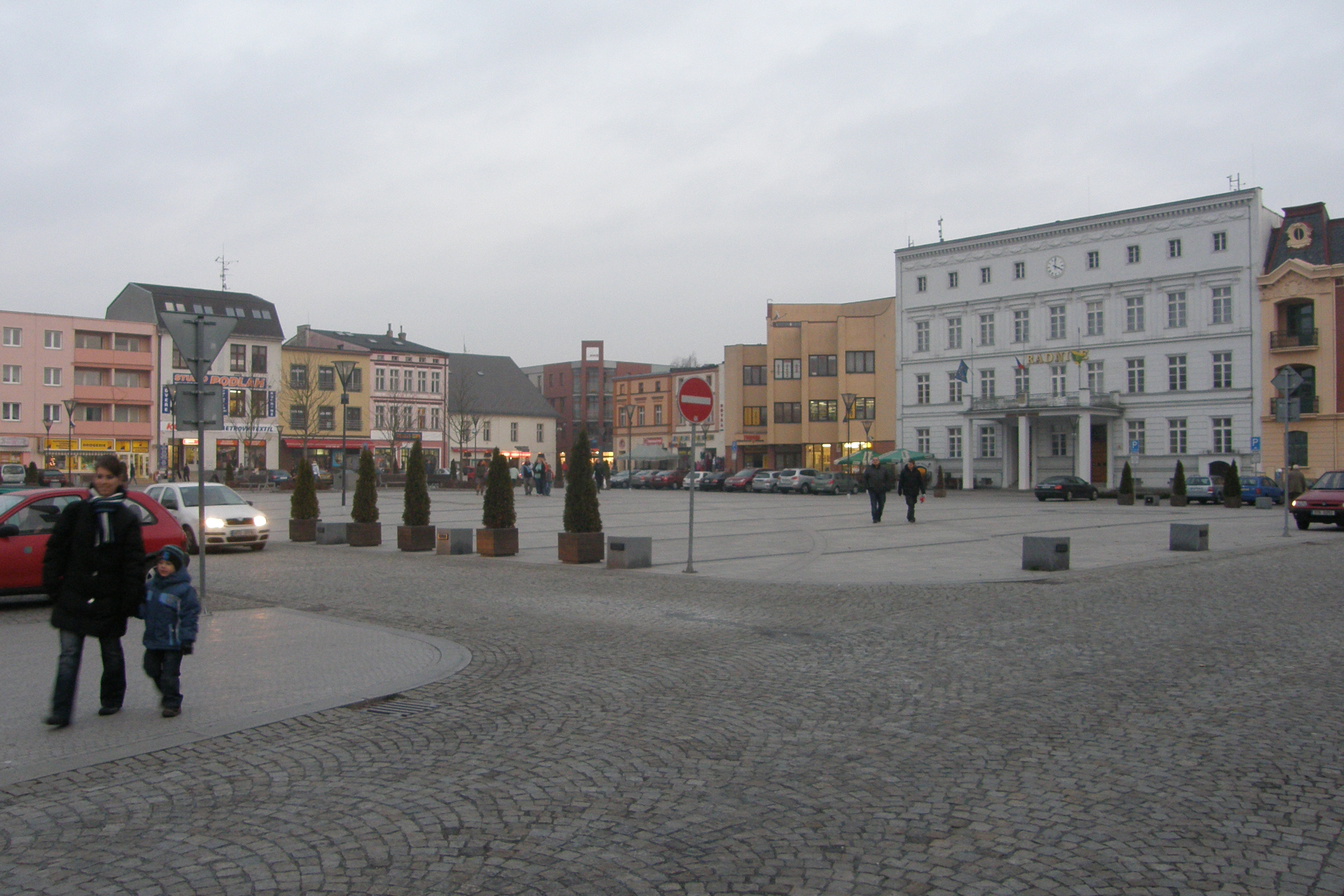 Mírové náměstí v Hlučíně